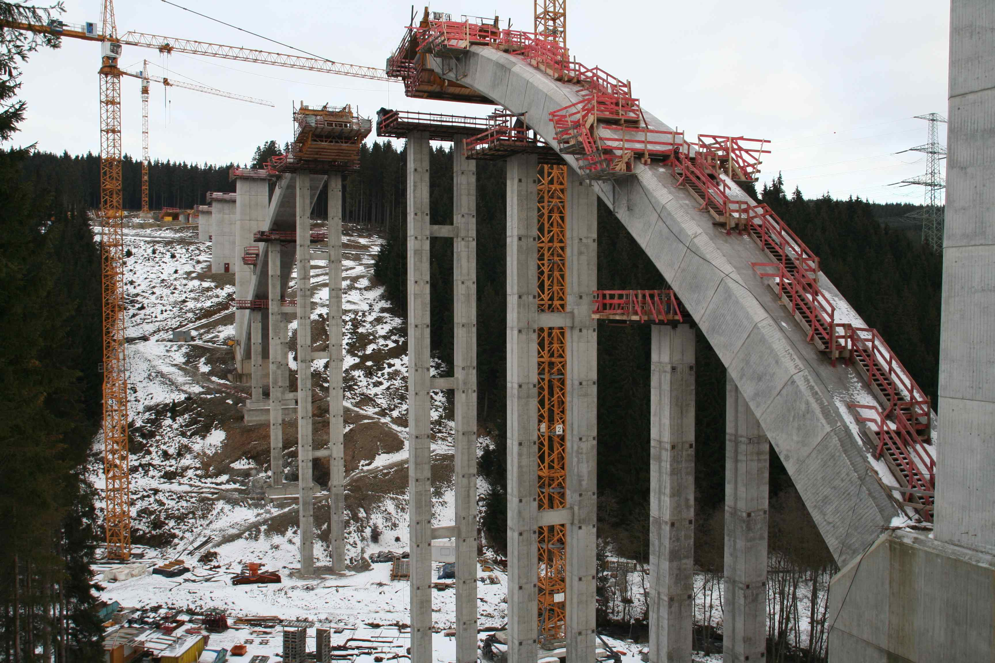 Oelzetalbrücke bei Altenfeld im Thüringer Wald